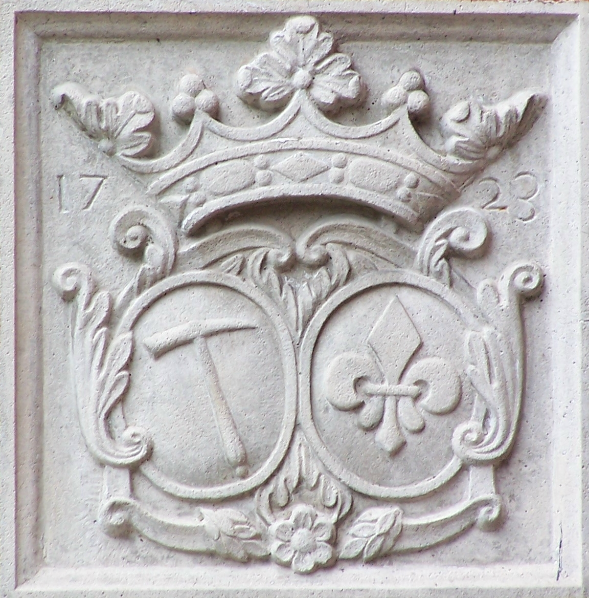 Burg Alsdorf Wappenstein